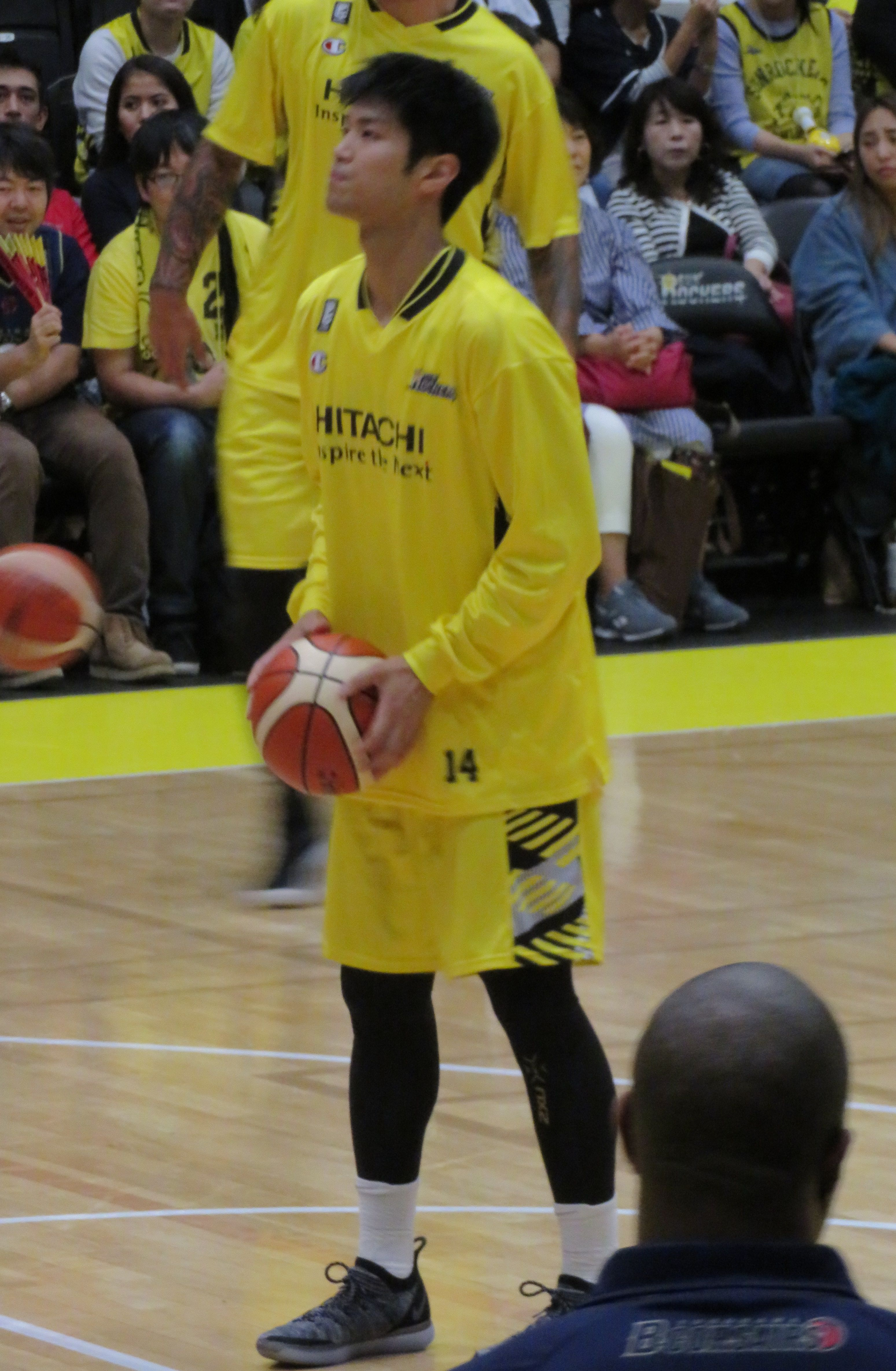 2018年10月28日撮影 2018-19 B1 第六節 渋谷-横浜 青山学院記念館